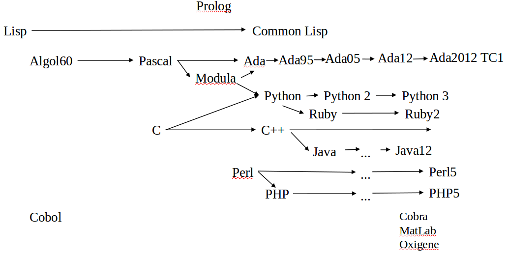 Programazio-lengoaia batzuen bilakaera